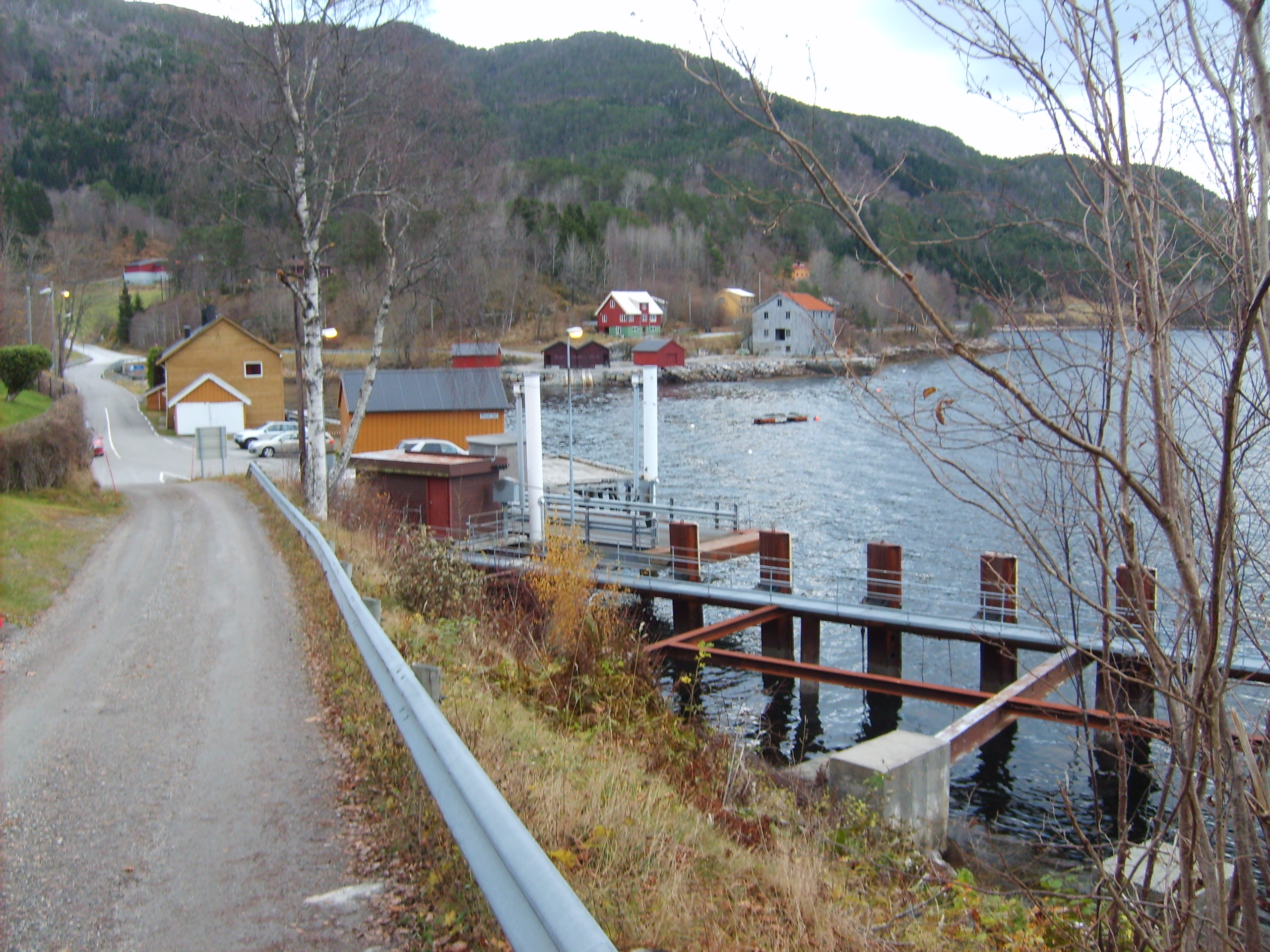 Arasvika ferjekai og Vågosen på Ertvågsøya|.